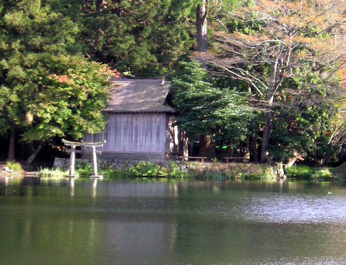 金鱗湖と湖畔の天祖神社（大分県由布市湯布院町川上、由布院温泉、俗称、湯布院温泉と呼ばれることもある）